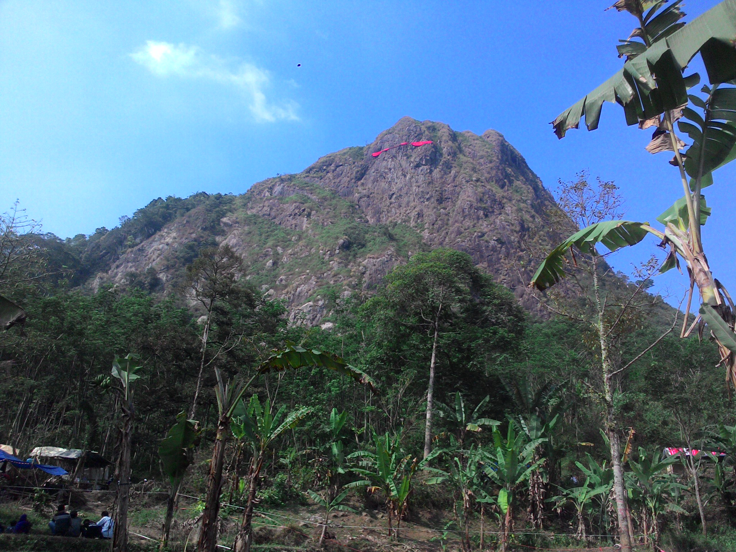 Pemandangan Gunung Batu dilihat dari pos perkemahan Gunung Batu